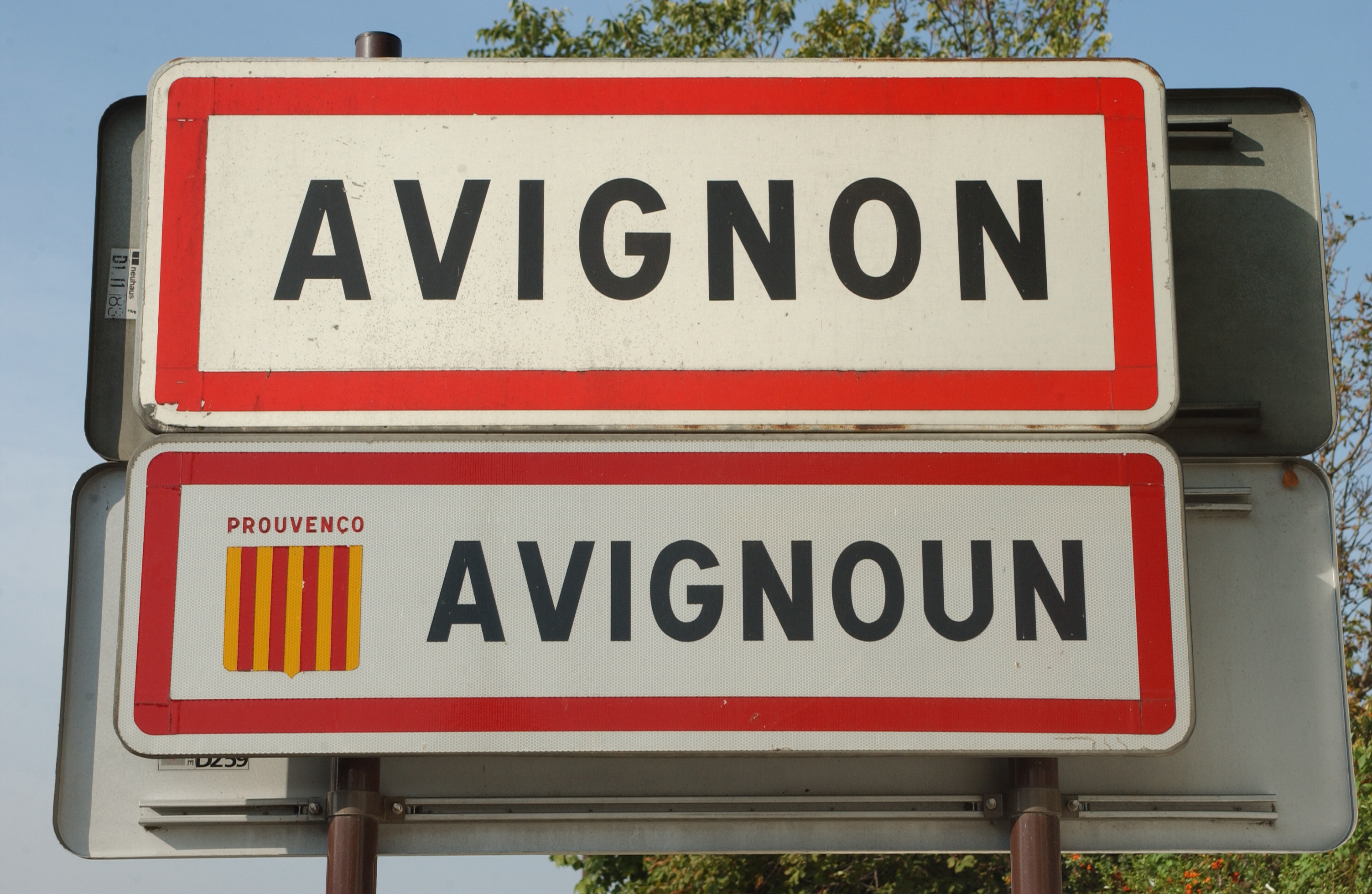 Panneau entrée de ville Avignon